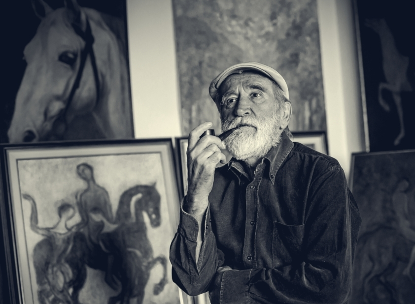 Josip Konta u ateljeu 2015. godine